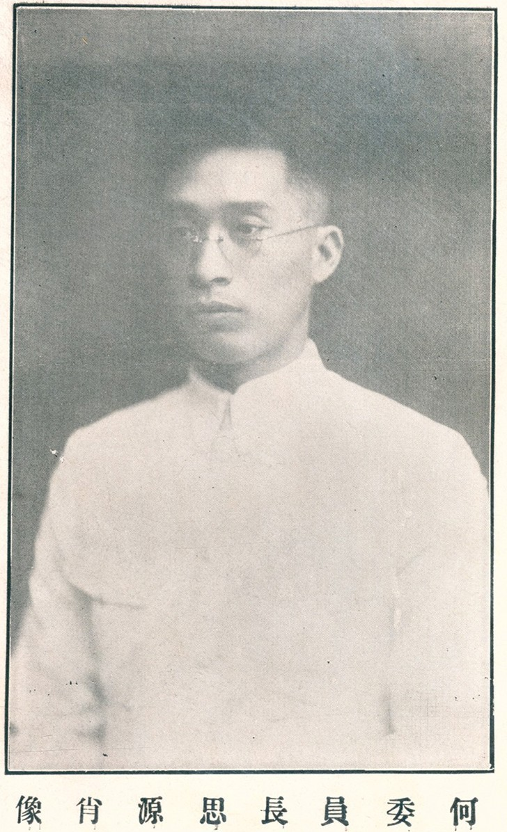 山東省學生暑期軍訓特刊附圖